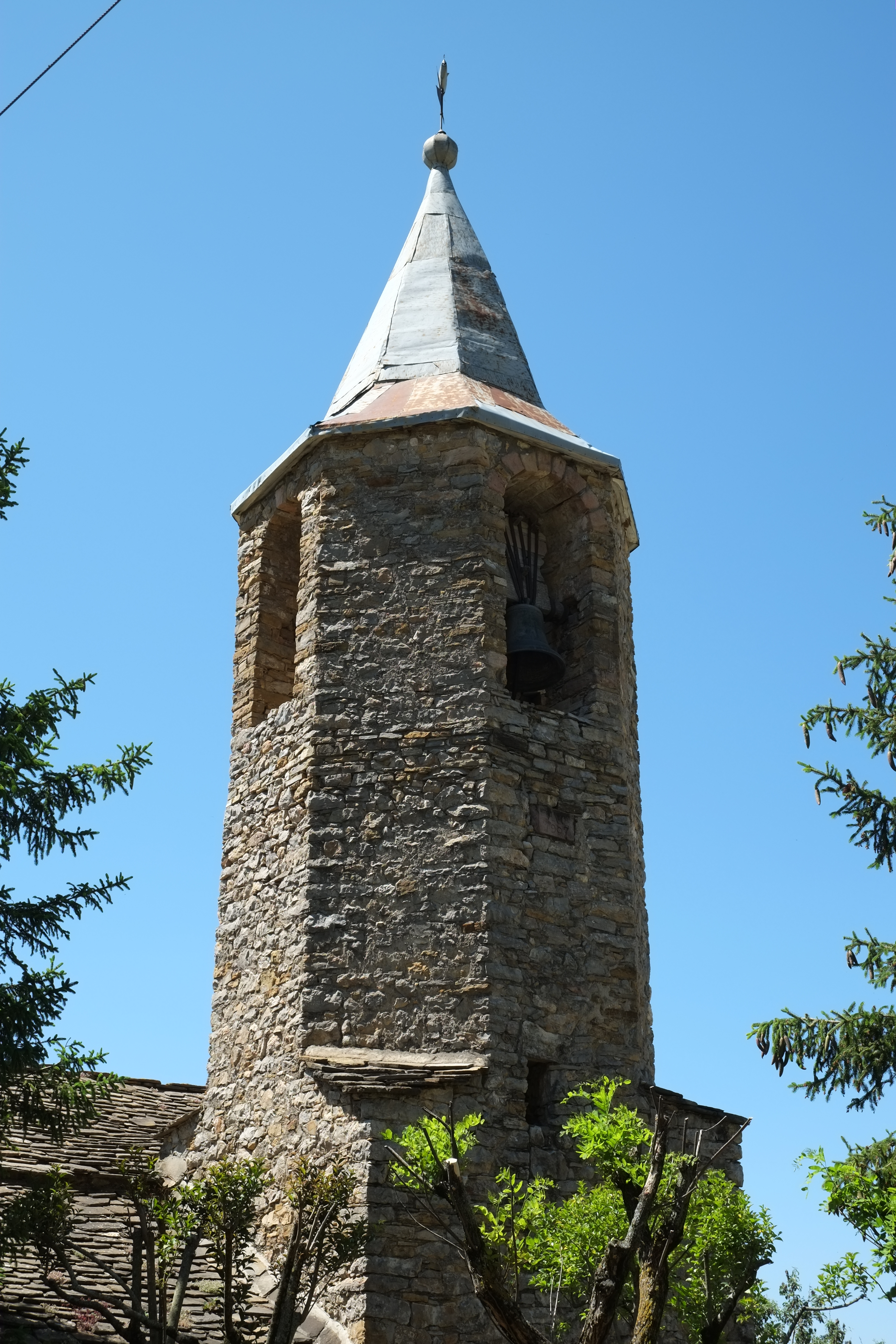 Kirche San Andrés in Calvera in Aragonien (Spanien)